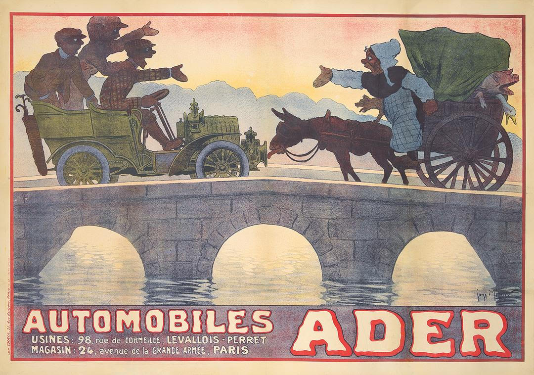 Locandina d'epoca della cessata casa automobilistica Ader